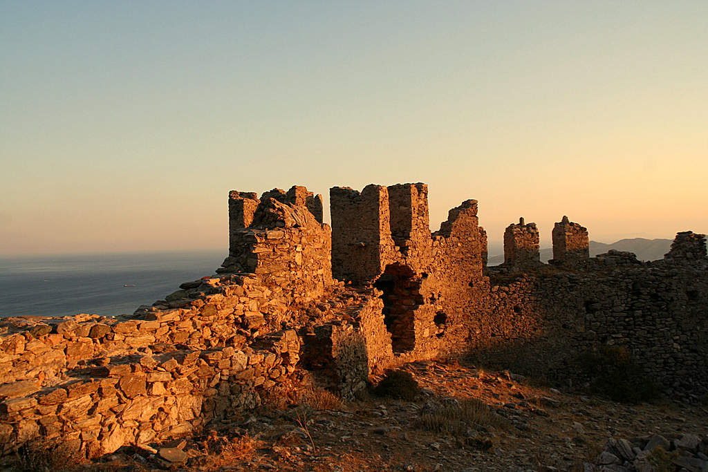 kastello rosso